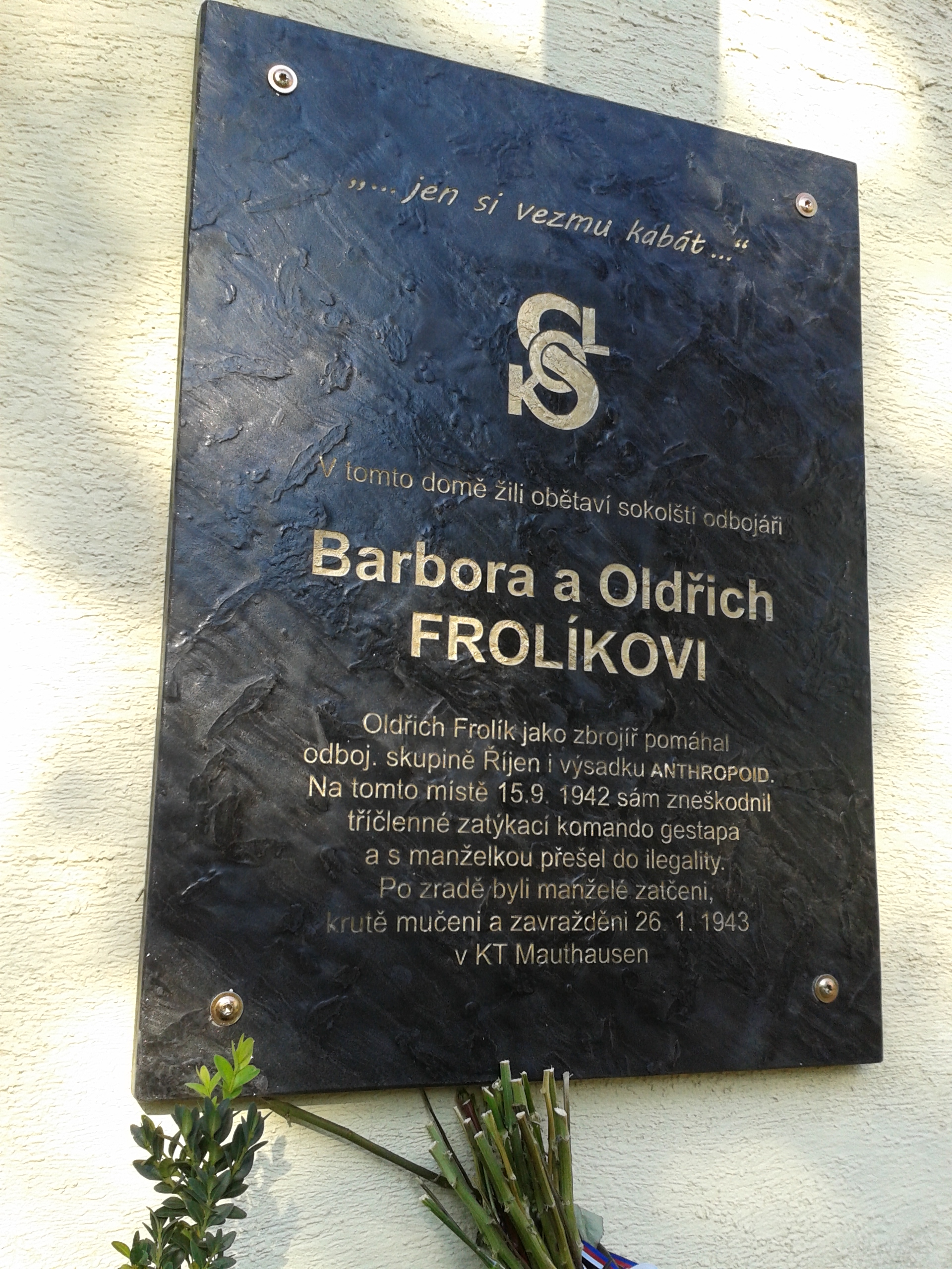 Ve čtvrtek dne 13. září 2018 v 17.00 byla na vnějším plášti domu v Kvestorské ulici (na adrese: Kvestorská 337/5, 140 00 Praha 4 - Michle), kde za protektorátu bydlel Oldřich Frolík se svojí manželkou Barborou Frolíkovou, za přítomnosti představitelů městské části Praha 4 (a badatele a spisovatele Jiřího Padevěta) slavnostně odhalena pamětní deska. O instalaci této pamětní desky se zasloužila Iniciativa A, Československá obec legionářská (ČsOL), MČ Praha 4 a Rota Nazdar. Na pamětní desce je nápis: „ ... jen si vezmu kabát ...“ // v tomto domě žili obětaví sokolští odbojáři / Barbora a Oldřich / Frolíkovi // Oldřich Frolík jako zbrojíř pomáhal / odboj. skupině Říjen i výsadku ANTHROPOID. / Na tomto místě 15.9. 1942 sám zneškodnil / tříčlenné zatýkací komando gestapa / a s manželkou přešel do ilegality. / Po zradě byli manželé zatčeni, / krutě mučeni a zavražděni 26. 1. 1943 / v KT Mauthausen. Oldřich Frolík (* 11. dubna 1909 - 26. ledna 1943, KT Mauthausen) byl jedním z podporovatelů výsadku Anthropoid. Pro Jozefa Gabčíka a Jana Kubiše připravoval zbraně, staral se jim o výzbroj a o munici. Spolu se svojí manželkou Barborou zajišťoval pro parašutisty i úkryt.